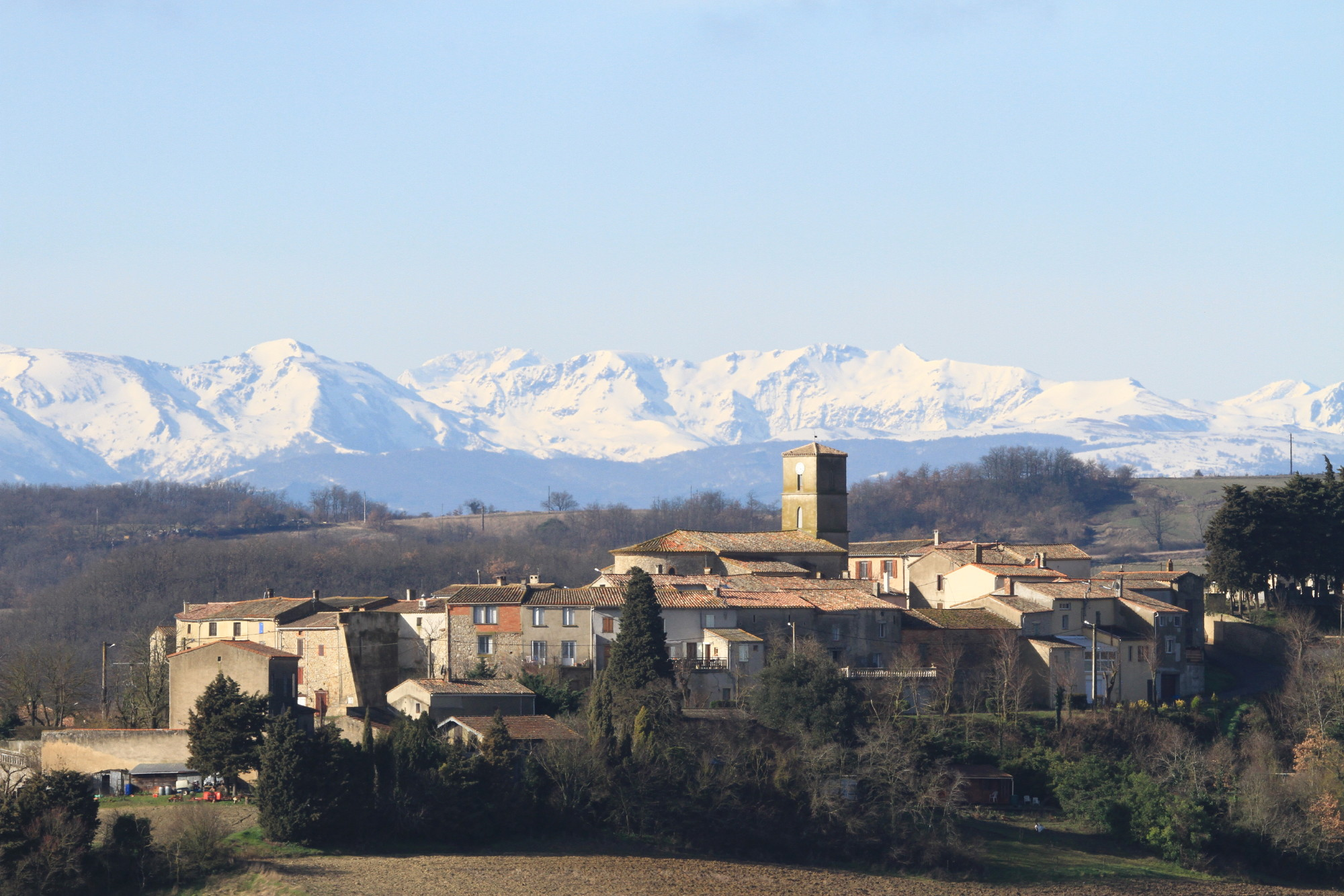 Vue du village avec les Pyrénées ariégeoises en arrière plan.